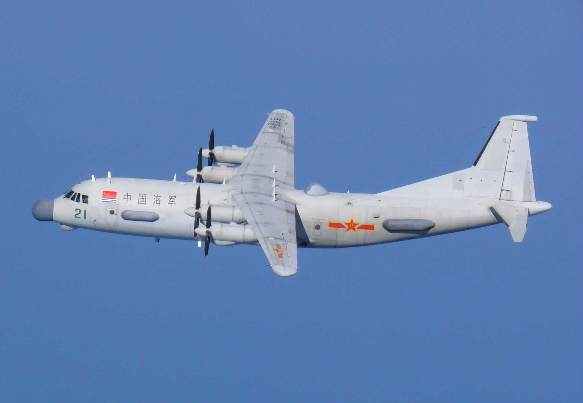 中国Ｙ－９型（情報収集機型）